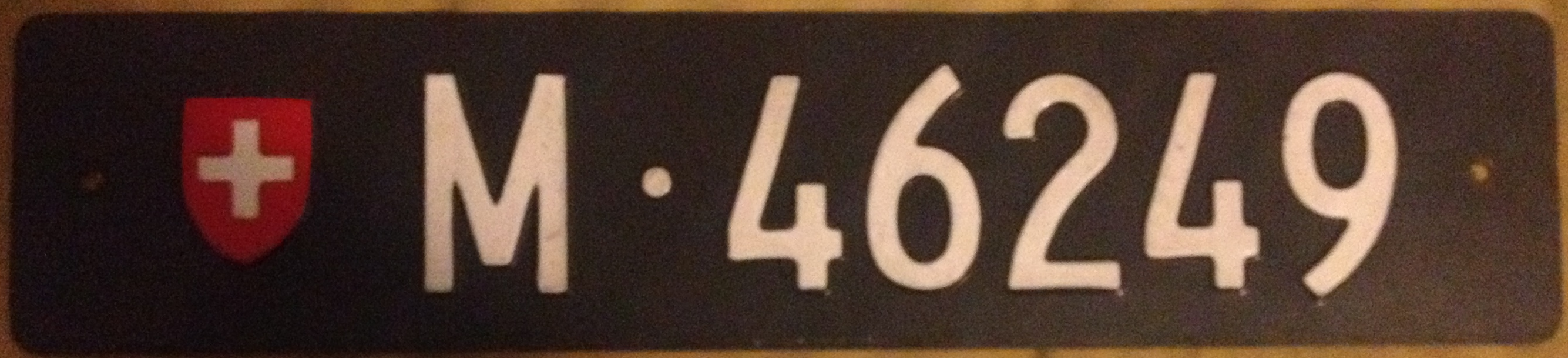 Plaque militaire suisse